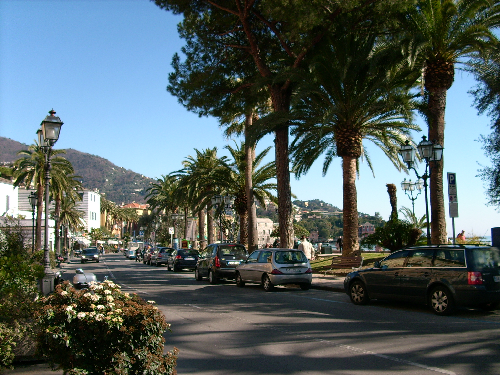 Lungomare Vittorio Veneto di Rapallo